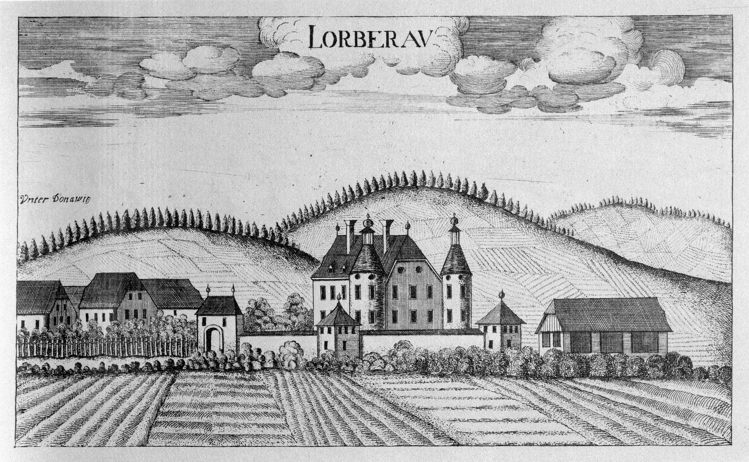 G. M. Vischers Käyserlichen Geographi, Topographia Ducatus Stiriae, Das ist: Eigentliche Delineation / und Abbildung aller Städte / Schlösser / Marcktfleck / Lustgärten / Probsteyen / Stiffter / Clöster und Kirchen / so es sich im Herzogthumb Steyrmarck befinden; Und anjetzo Umb einen billichen Preyß zu finden seynd Bey Johann Bitsch Universitäts Buchhandlern / Auff dem Juden=Platz bey der guldenen Saulen. Graz 1681 Die Nummerierung der Dateien folgt der alphabetischen Reihung der Ortsnamen